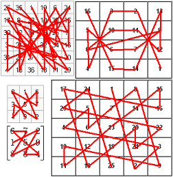 Image créée le 8 décembre 2006 par Boris Christ pour l'article concernant les Carrés magiques sur Wikipédia. Les carrés magiques de cette image sont des copies d'écran de ce même article.